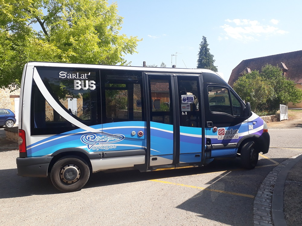 Photographie latérale d'un Dietrich Noventis 420 utilisé pour le Sarlat'Bus (exploité par Périgord Voyages)